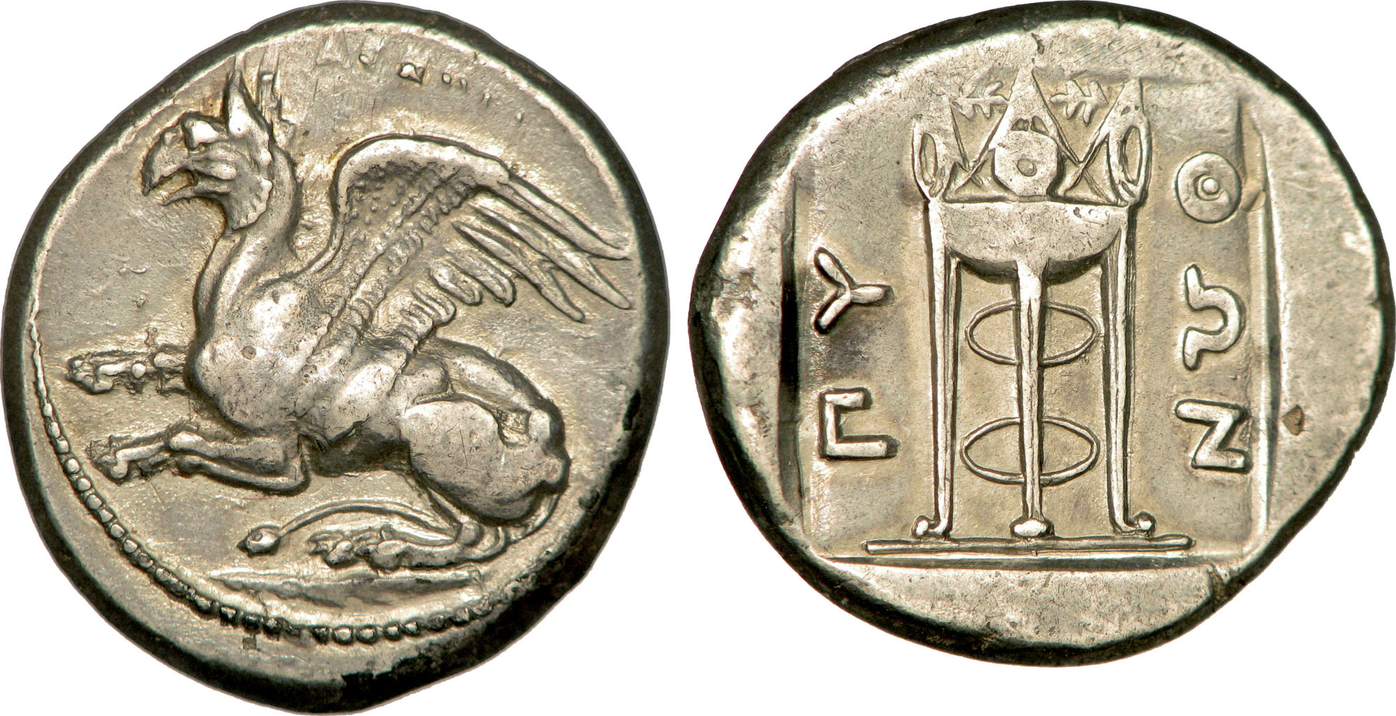 Nom de l'atelier : Thrace, Abdère Métal : argent Diamètre : 24,5mm Axe des coins : 9h. Poids : 12,61g. Description avers : Griffon bondissant à gauche, les ailes ouvertes. Légende avers : ABDHRI Traduction avers : (d’Abdère). Description revers : Trépied delphien décoré dans un carré creux. Légende revers : PU/QWN Traduction revers : (Python).